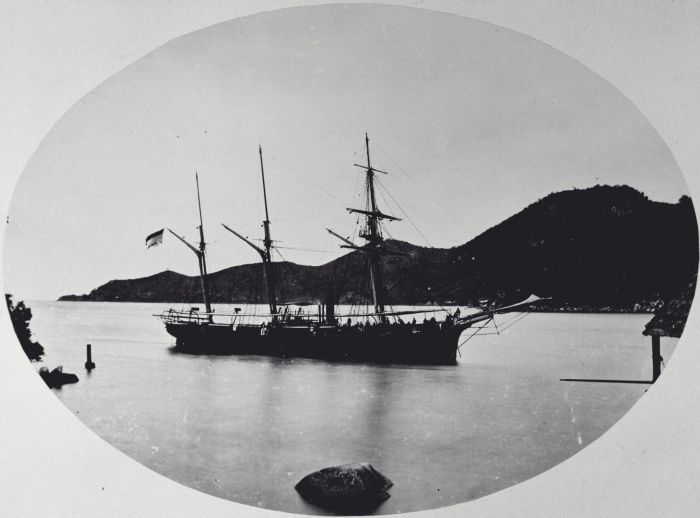 Foto. Een zeilschip in de Baai van Gorontalo